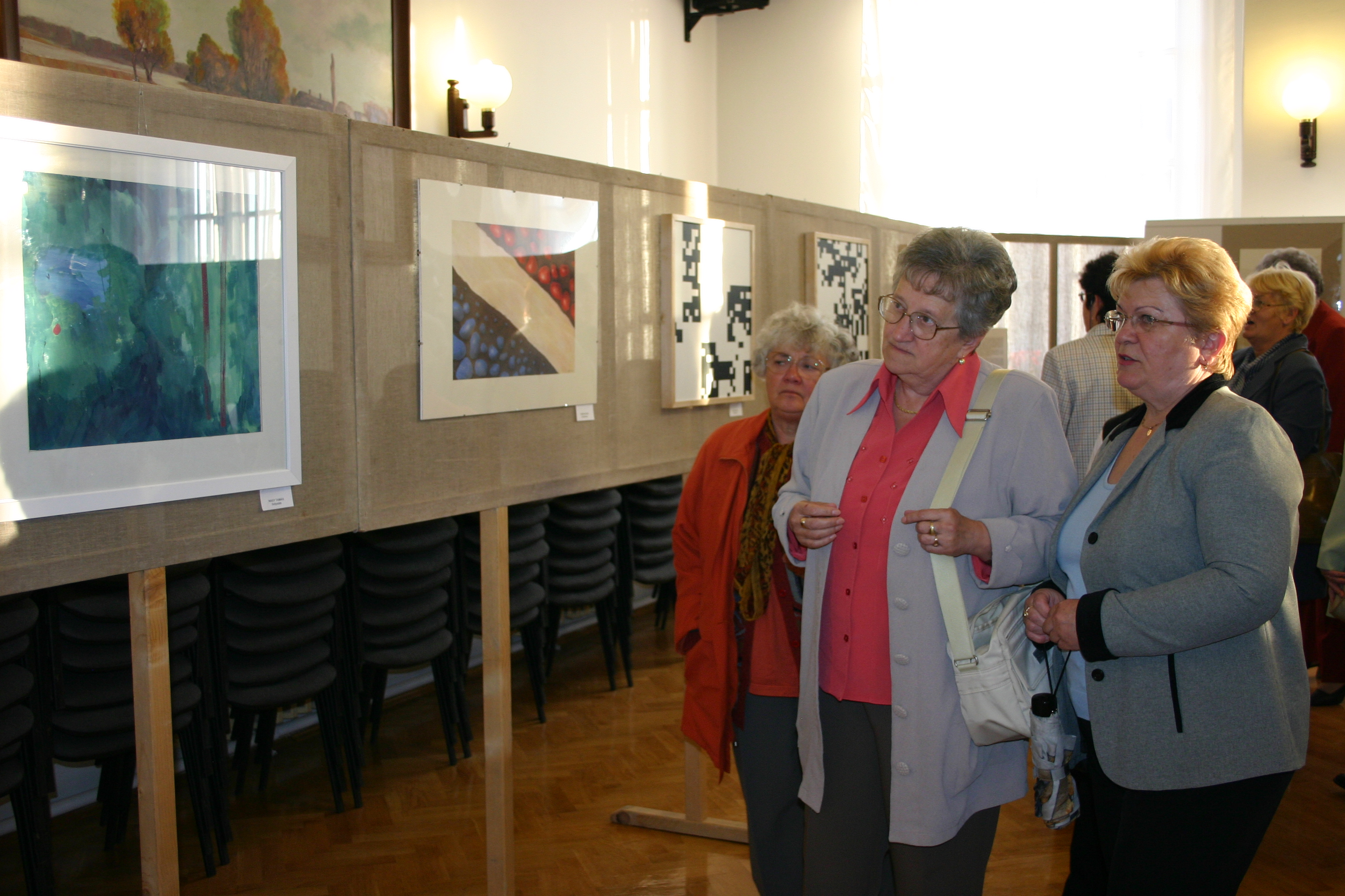 Hamza Studio-Természet, Jászárokszállás